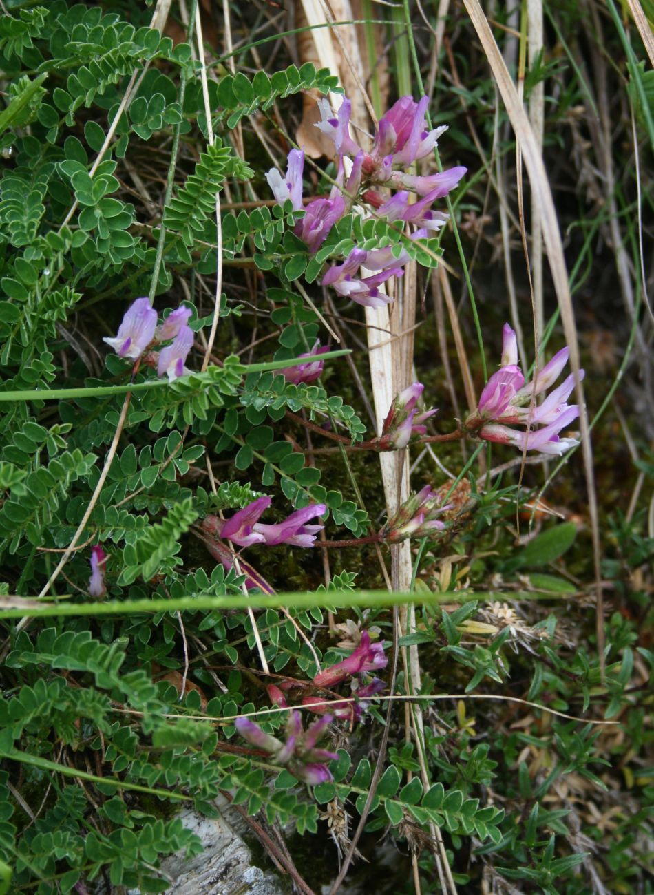 Astragalus monspessulanus, Hülsenfrüchtler (Fabaceae) - Italien/Italia/Italy: Toscana, Prov. Lucca, Parco Regionale delle Alpi Apuane, SW Rifugio Donegani SW Gramolazzo